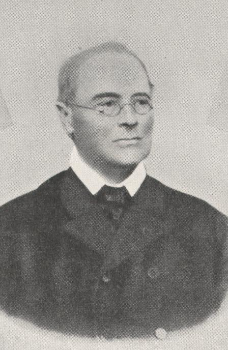 Prälat Alois von Schmid, Theologie-Professor München